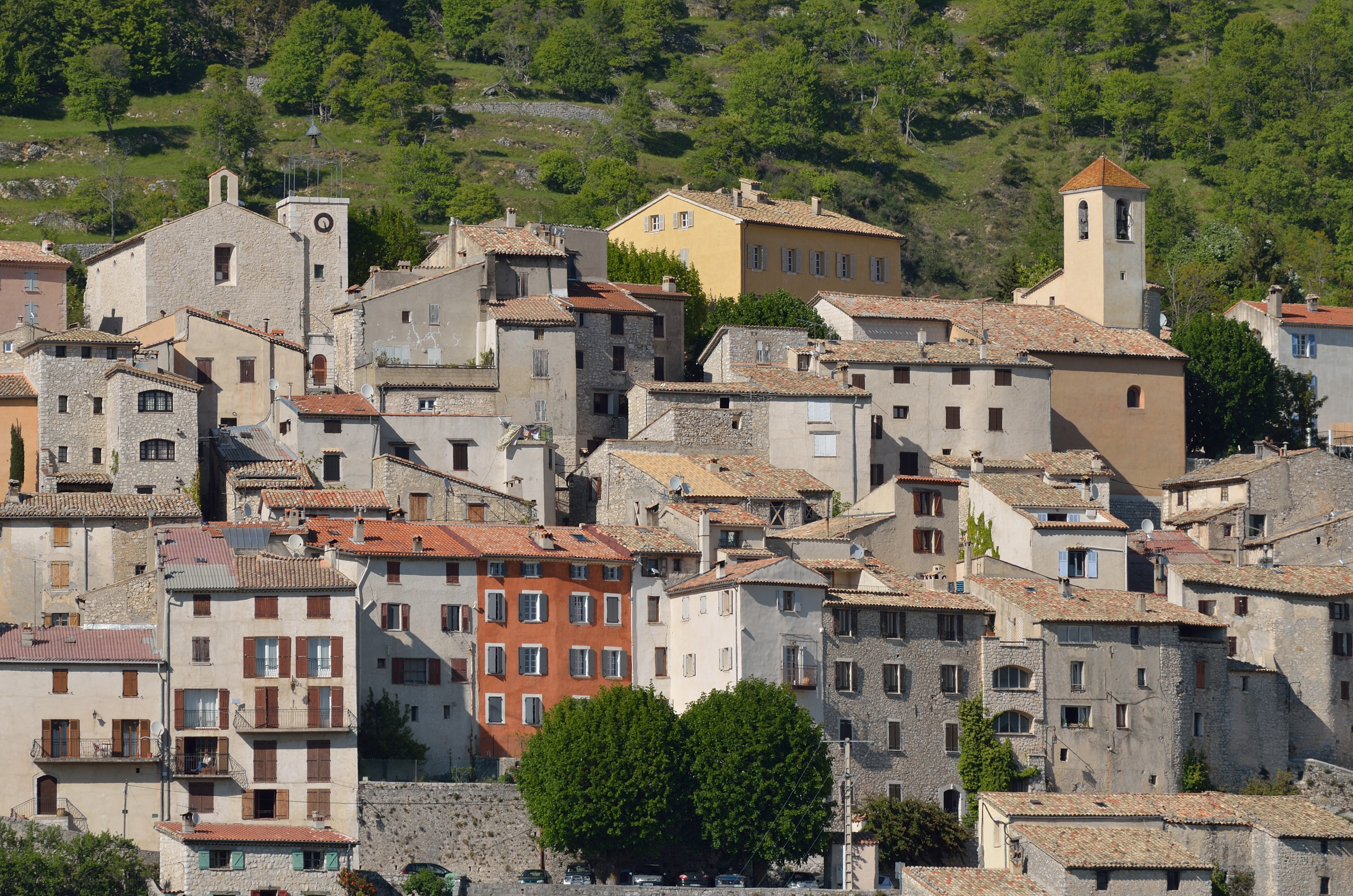 Village de Coursegoules (Alpes-Maritimes)